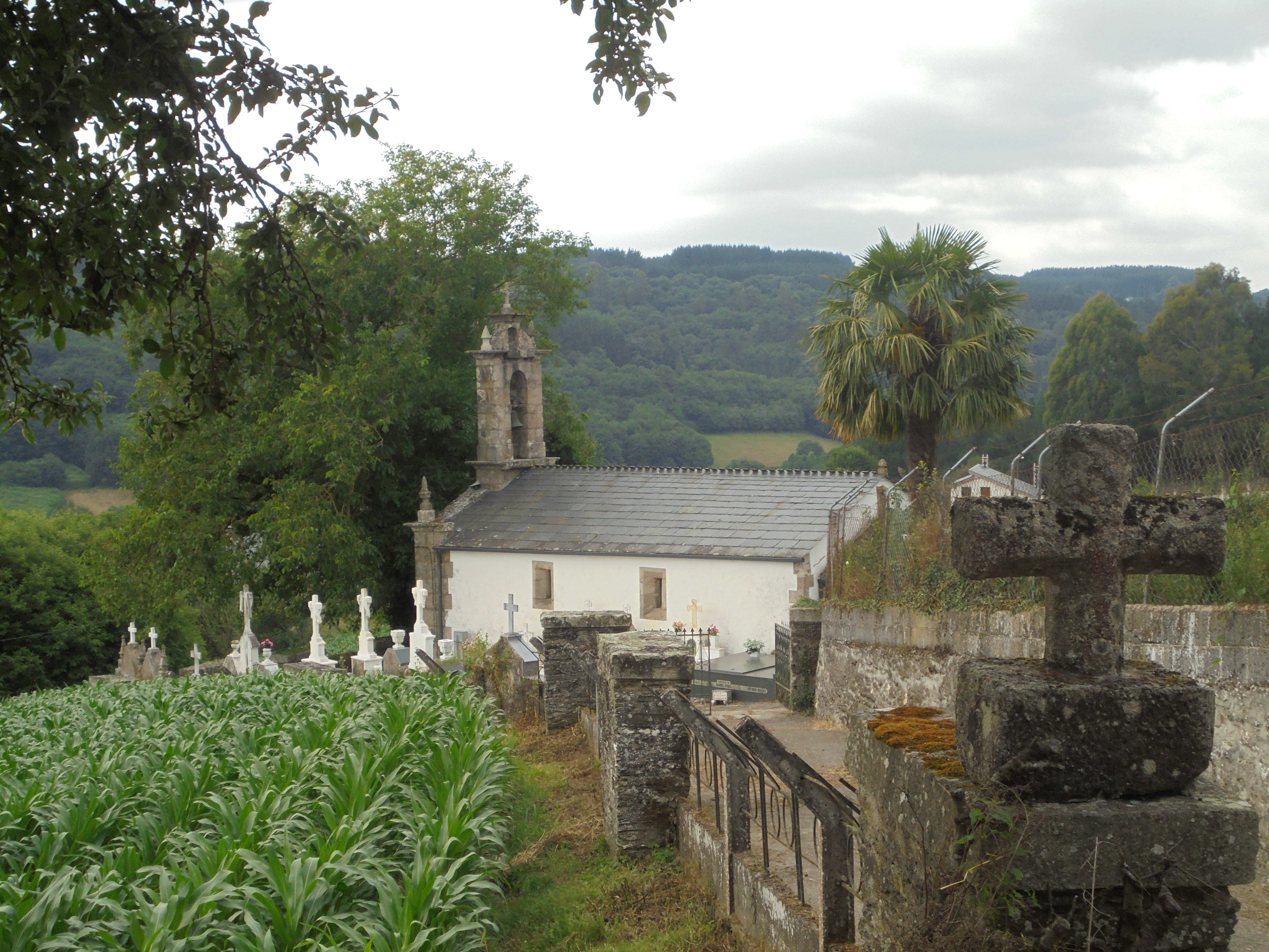 Igrexa de Quinte ( O Corgo)